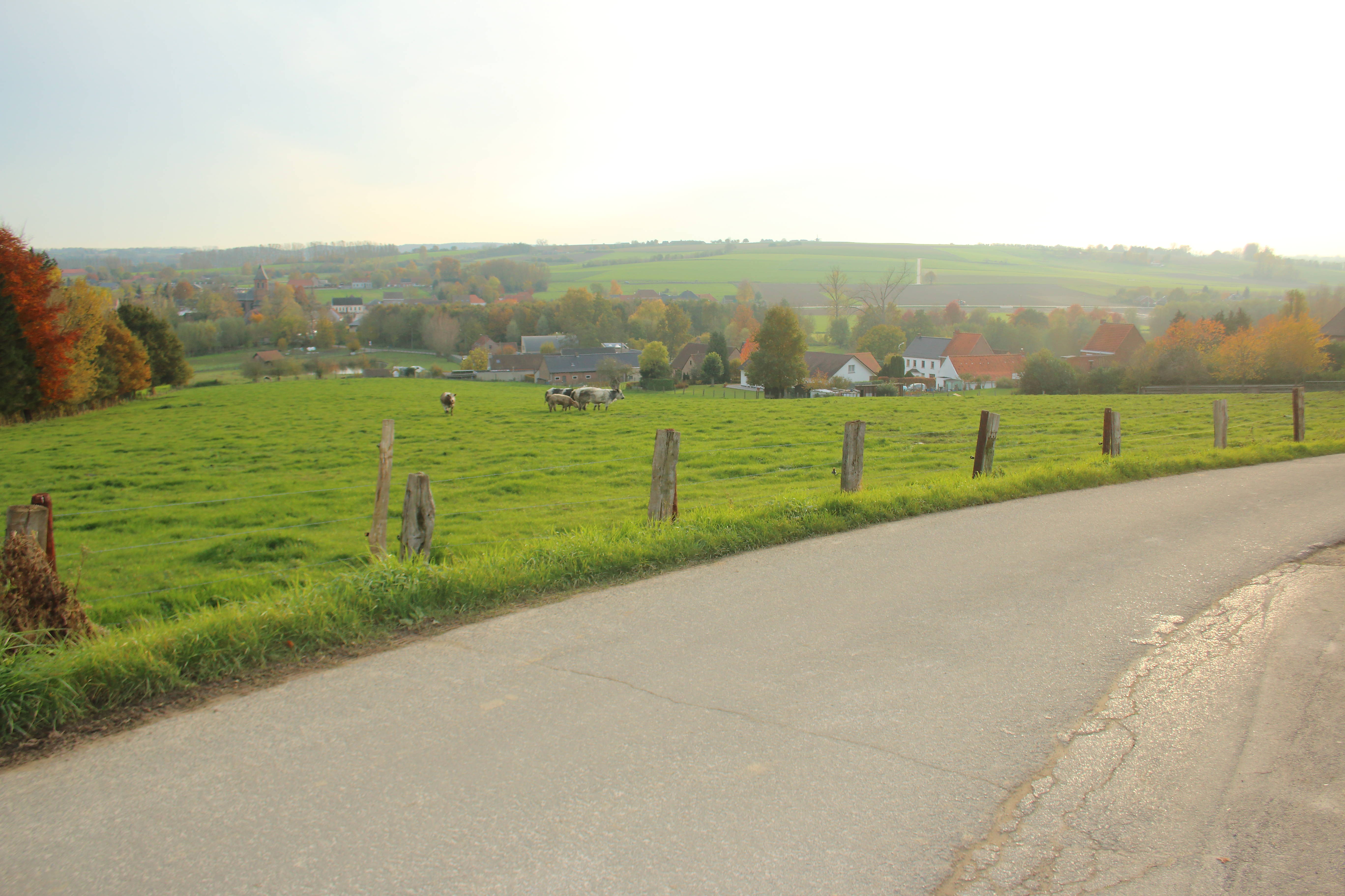 Kapelleberg, Maarkedal, Vlaanderen, België